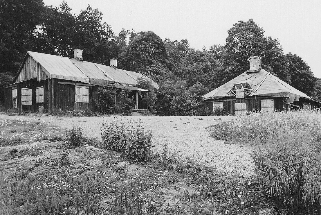 Sätra gård före renoveringen